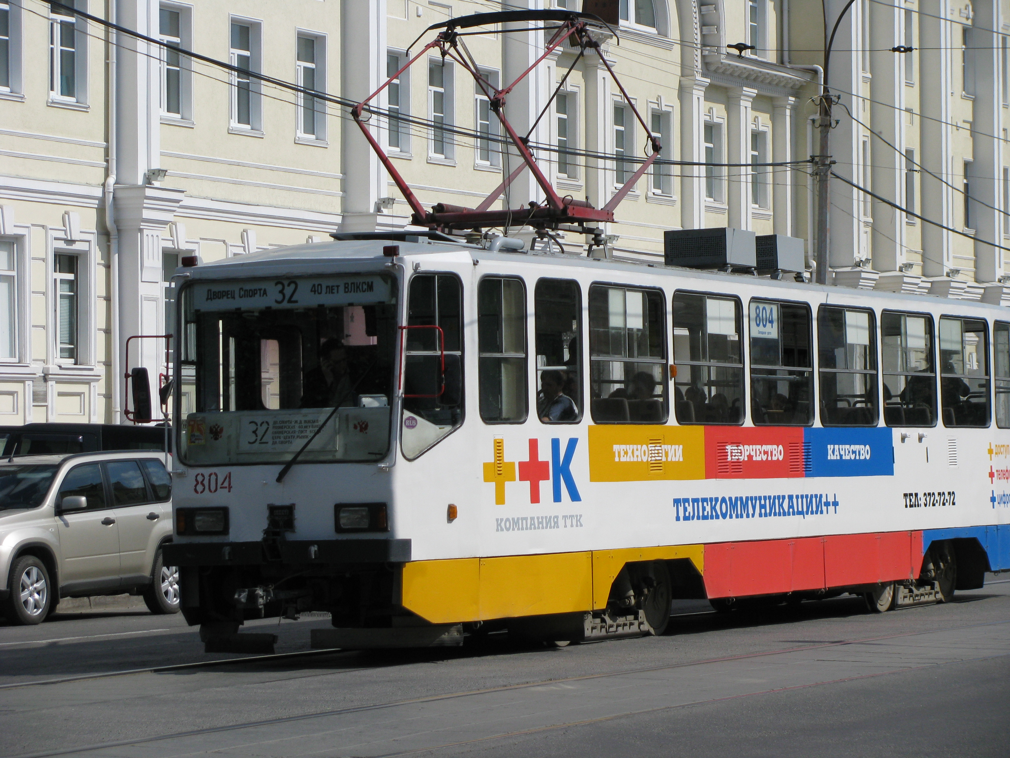 Трамвайный вагон "Спектр"